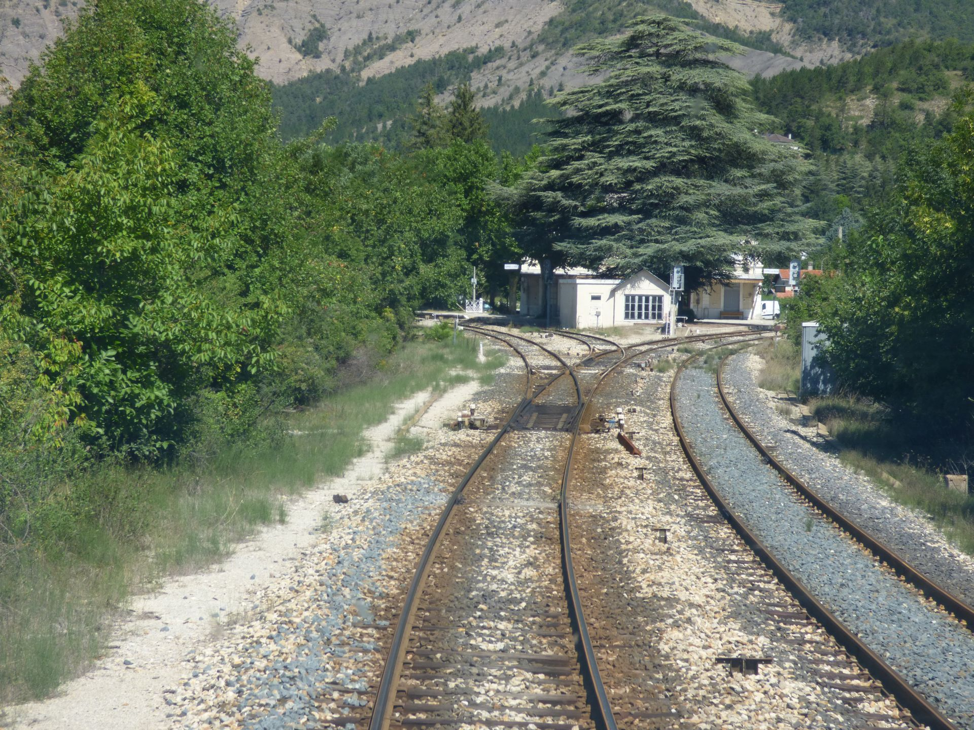 Bifurcation ferroviaire en gare d'Aspres sur Buëch (26) avec à Gauche la direction de Valence (26) et à droite celle de Grenoble (38)